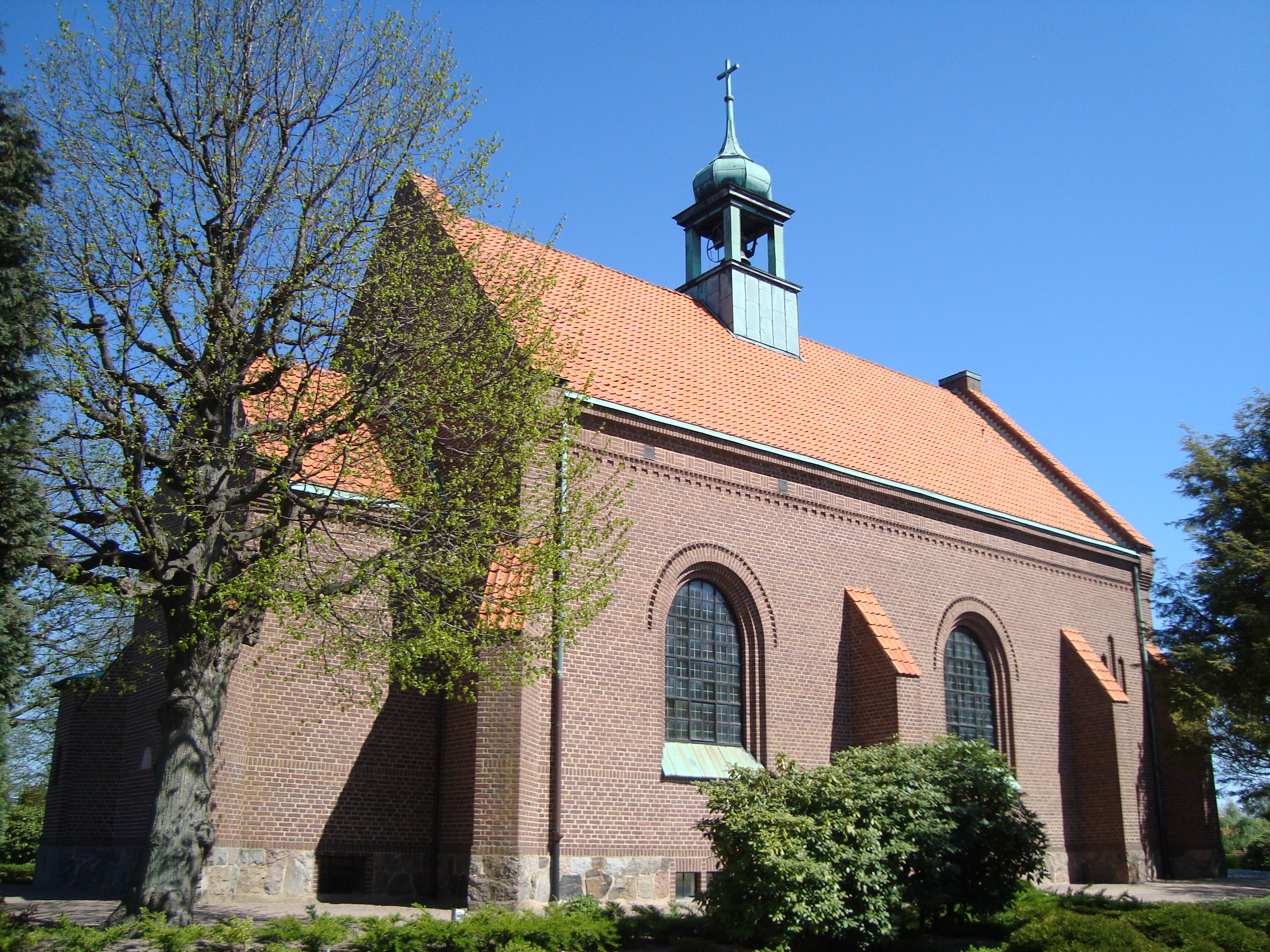 Begravningskapellet i Pålsjö kyrkogård i Helsingborg.